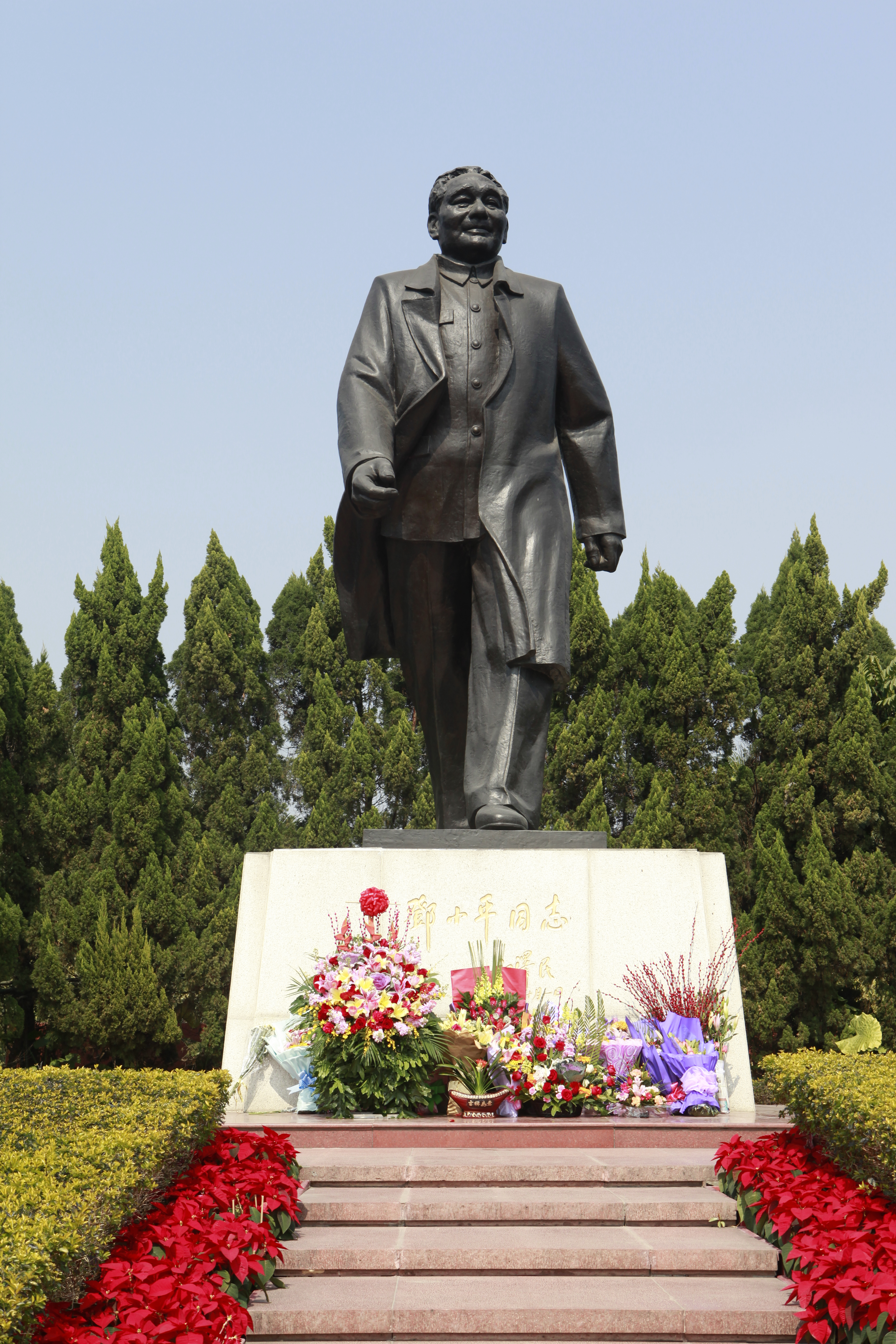 2011 深圳 莲花山顶－邓小平头像